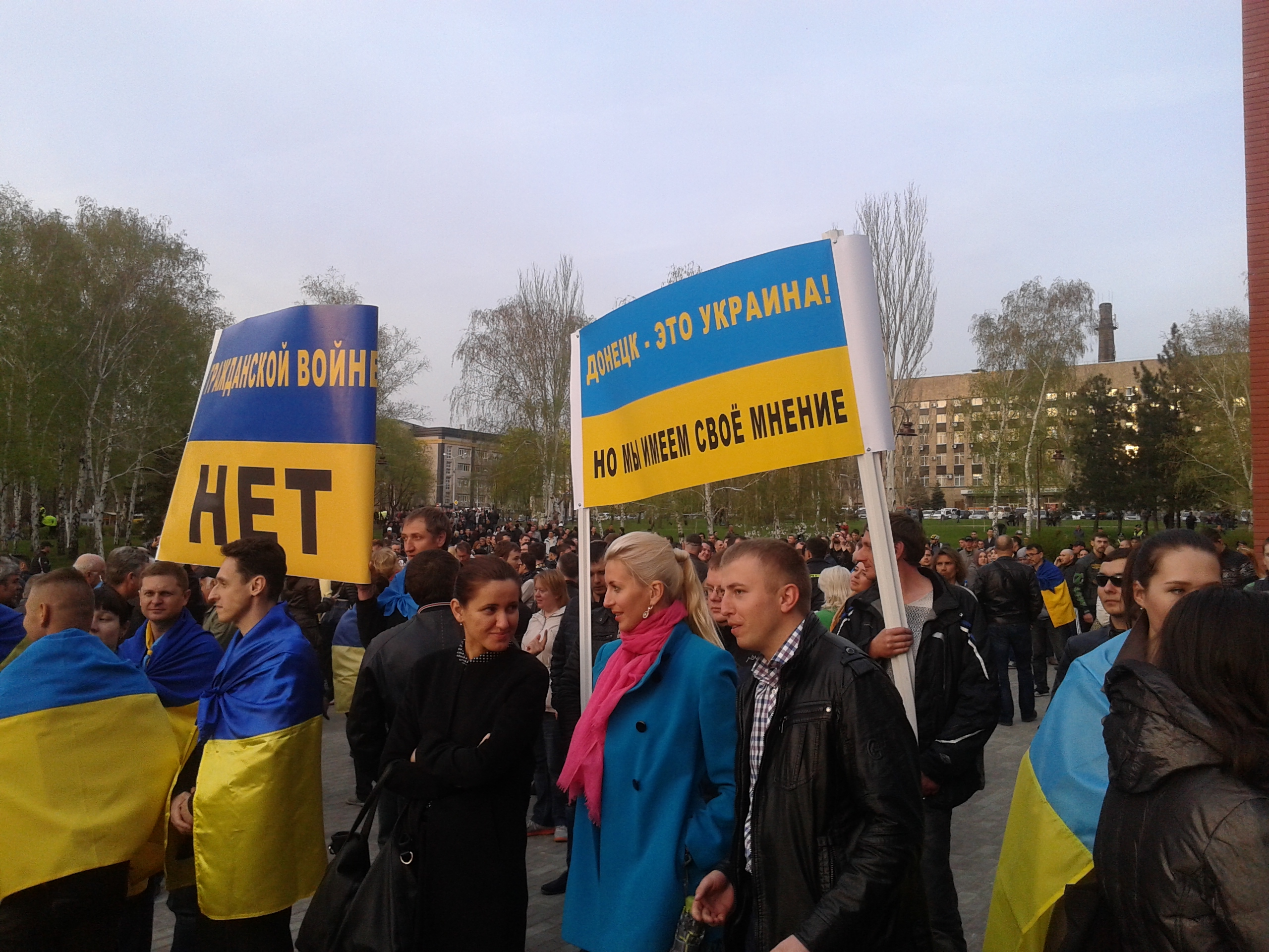 Мітинг у Донецьку за єдність України